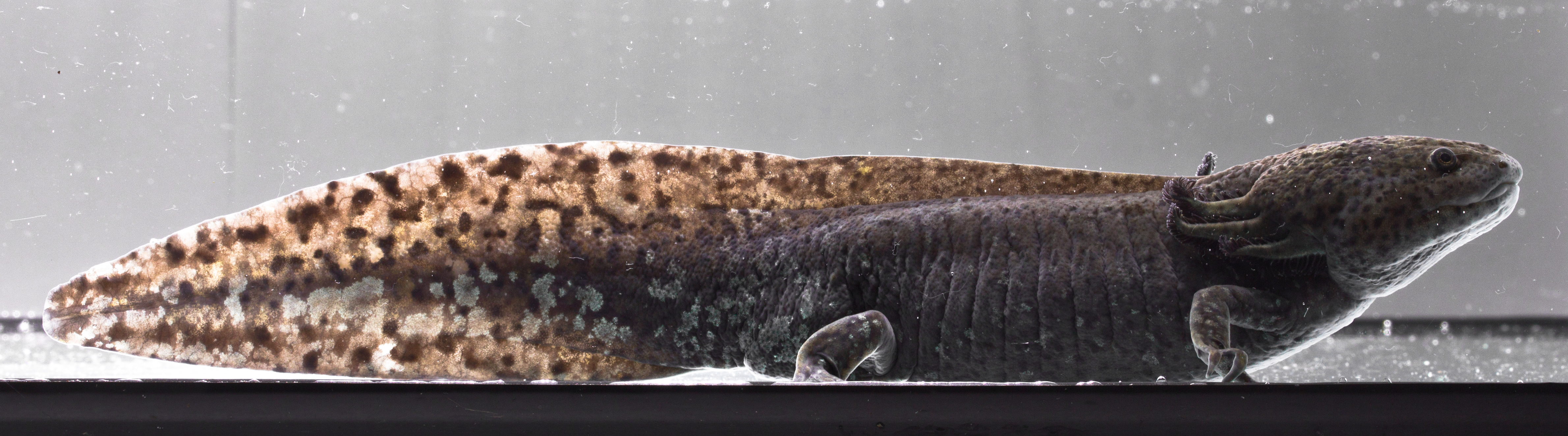 Adultes Ambystoma Mexicanum Männchen in Wildlingsfärbung